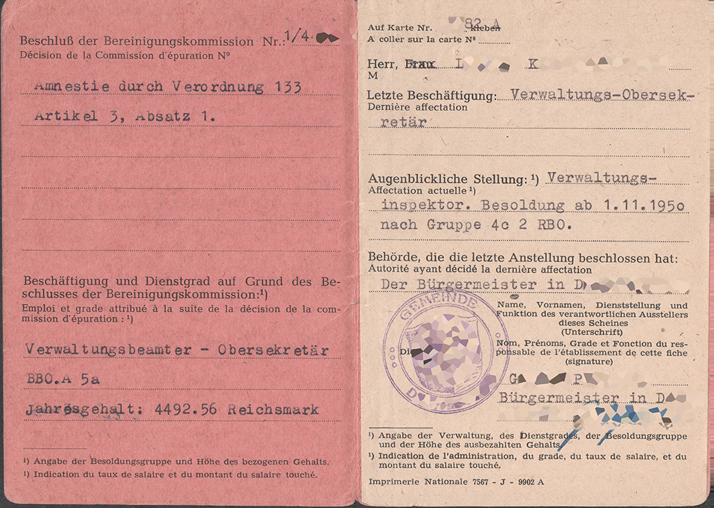 Immatrikulationskarte der Beamten, hier für einen Kommunalbeamten in Rheinland-Pfalz, mit Vermerk der Entscheidung der französischen Bereinigungskommission (Entnazifizierung). Klappkarte mit Einlegeblatt, Vorderseite.